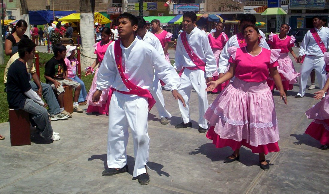 En la Plaza de Armas. Si no me equivoco, estaban bailando festejo. Imperial, Perú. At the Main Square. I think they're dancing "festejo". Imperial, Peru.